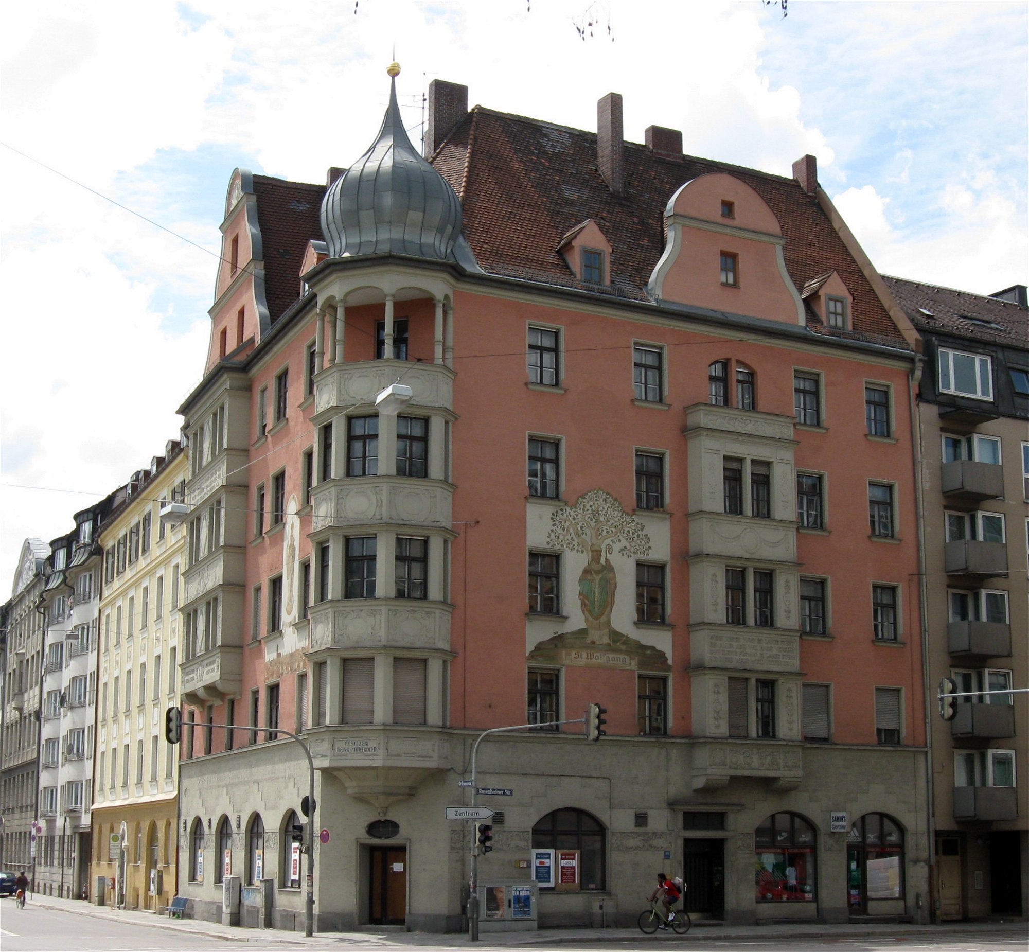 Rosenheimer Straße 108; Mietshaus, stattlicher Eckbau in deutscher Renaissance, mit Erkern, reichem Dekor und Wandgemälden, bez. 1904, von Ernst Günther.